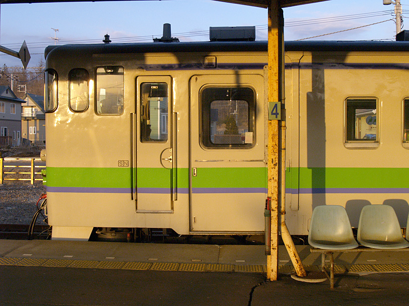 Ikeda Sta.